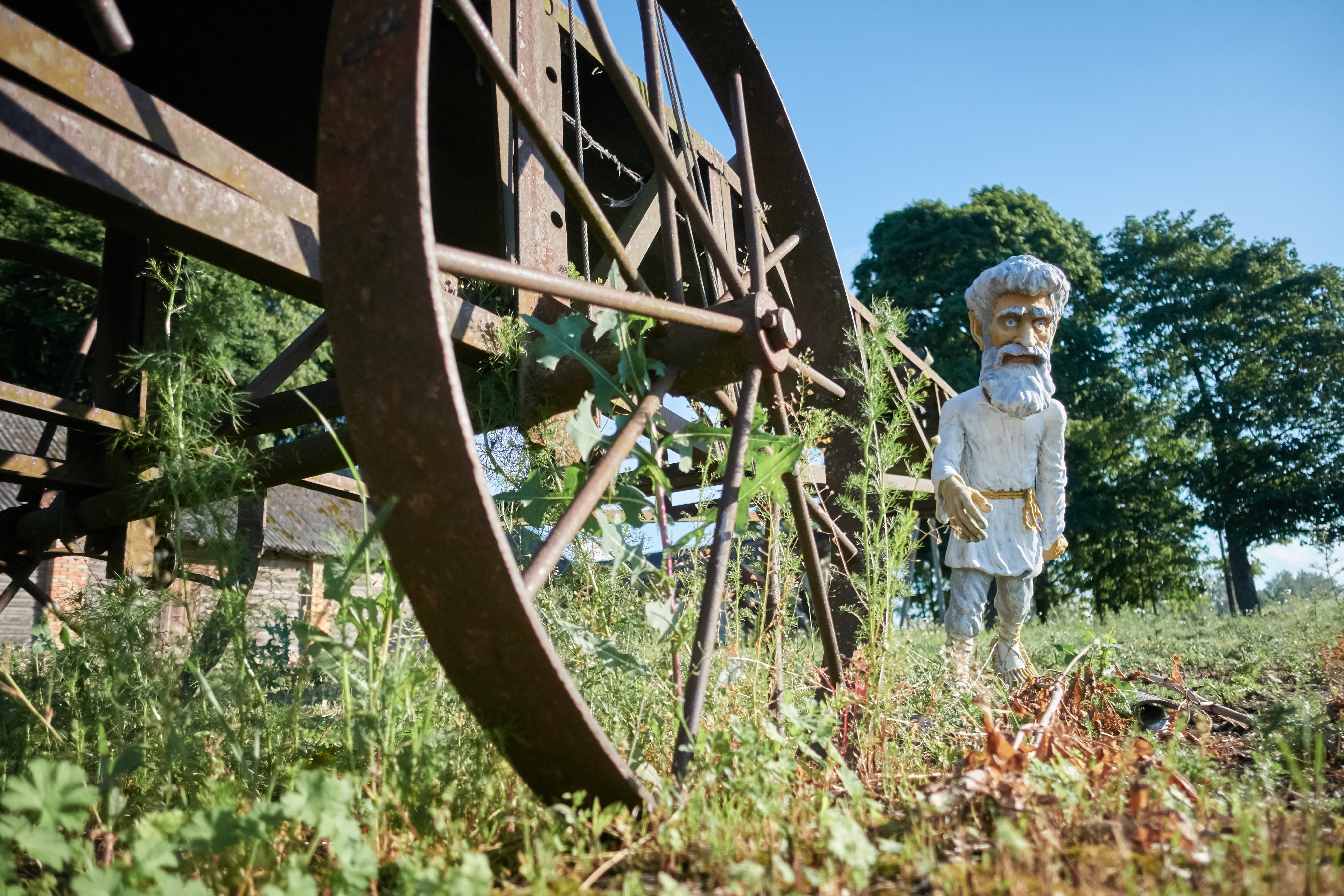 Житень (житный дед, белор. жыцень, жытні дзед) — дух, хозяин поля у белорусов.